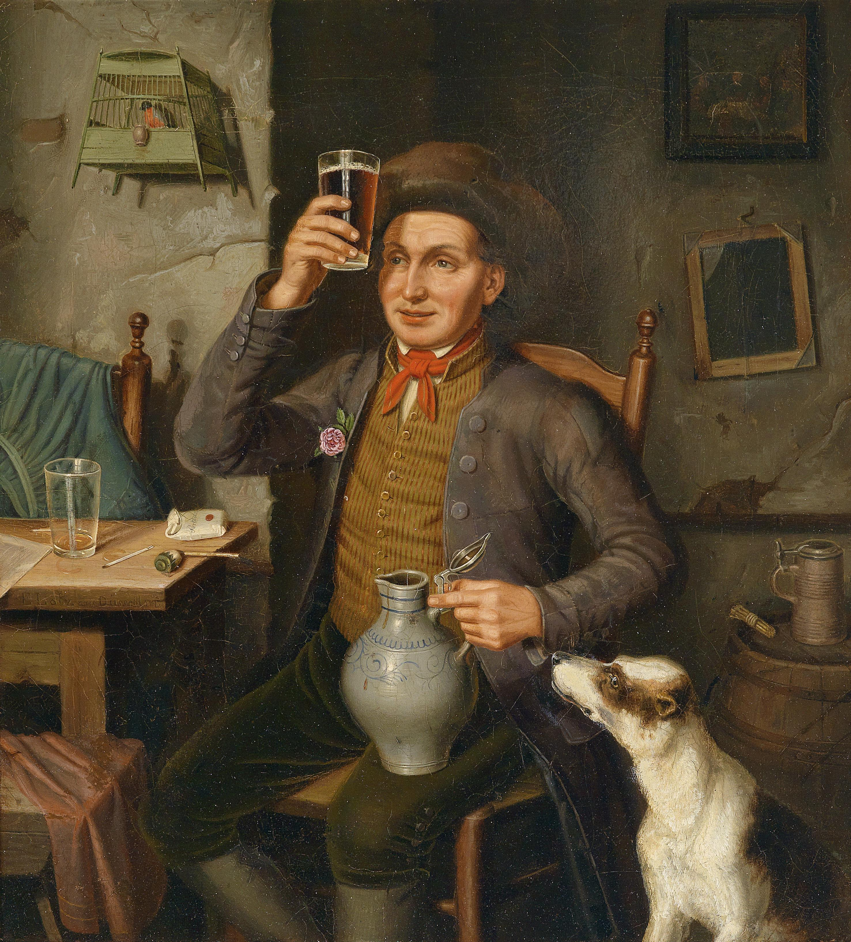 Ein guter Tropfen, signiert, bezeichnet E. Lotz aus Düsseldorf, Öl auf Leinwand, 42 x 38 cm